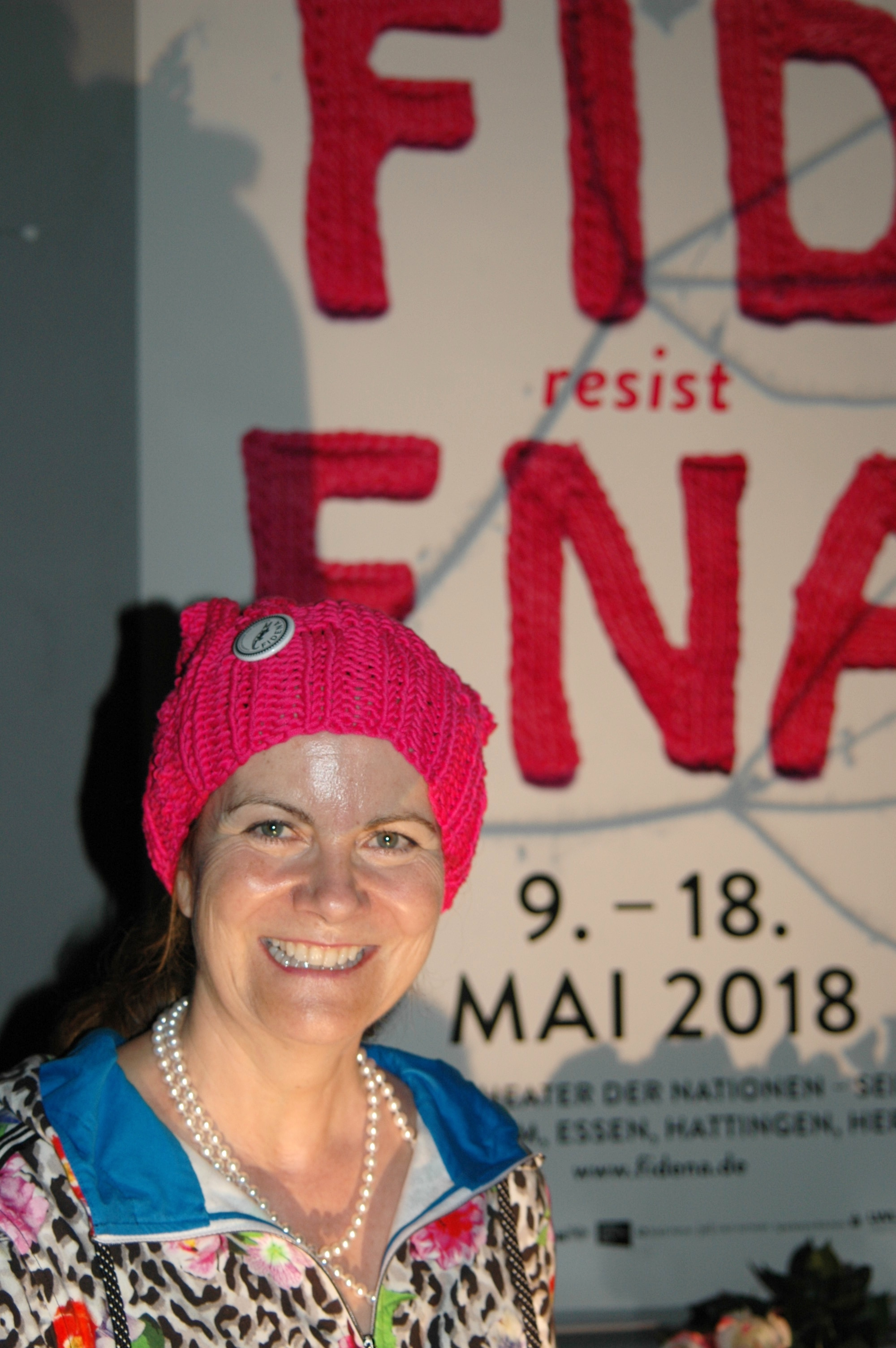 Annette Dabs (2018), Intendantin des internationalen Festivals Fidena